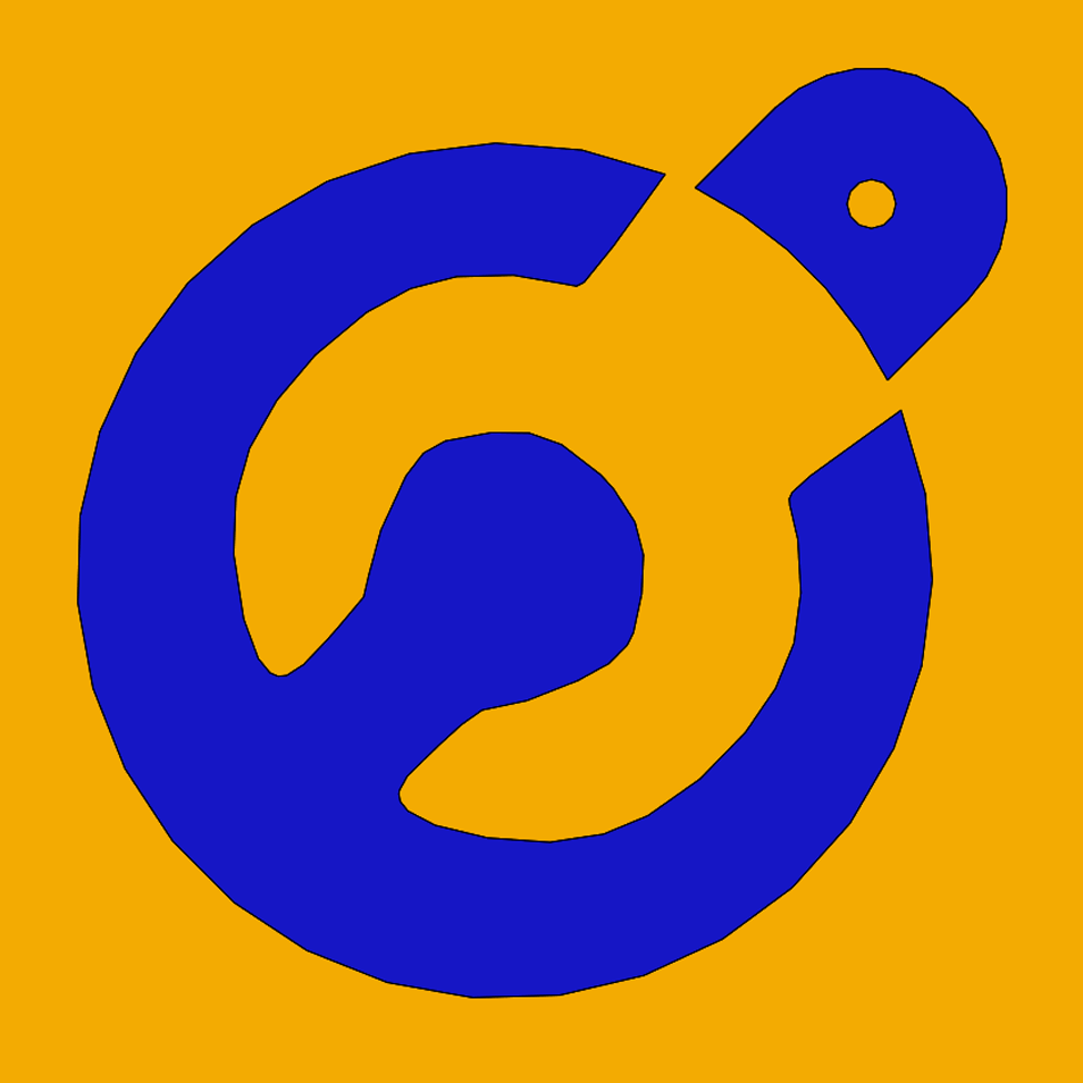 Banner der Charakterfigur Donnie aus der Zeichentrickserie Super Wings.